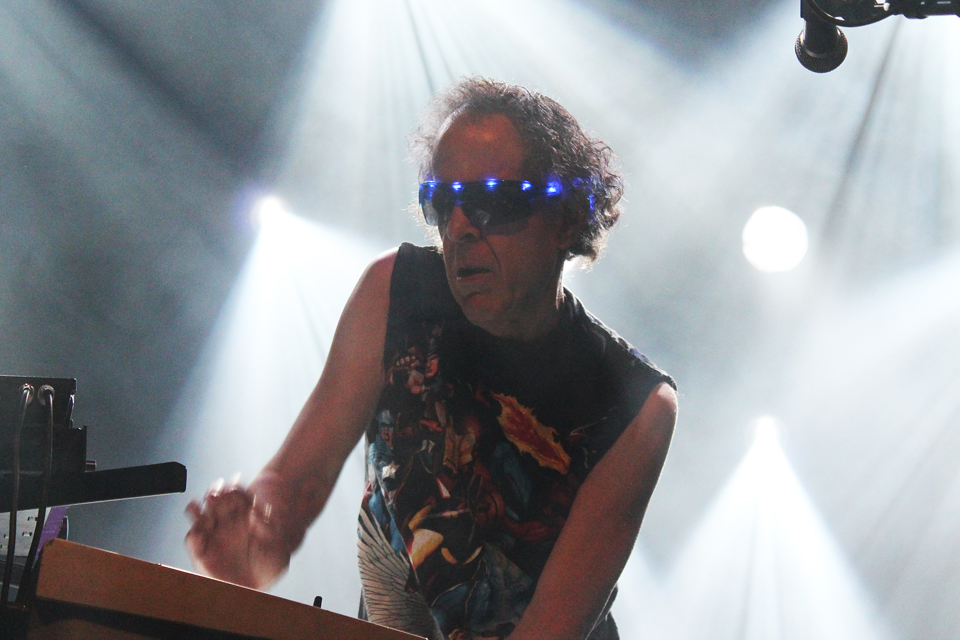 Martin Rev en concert pour Less Playboy is more cowboy #3 au Confort Moderne - Poitiers Mai 2012. Pour écouter l'album Les Nymphes. from Flickr album "Le Confort Moderne" by Xi WEG from Poitiers, France